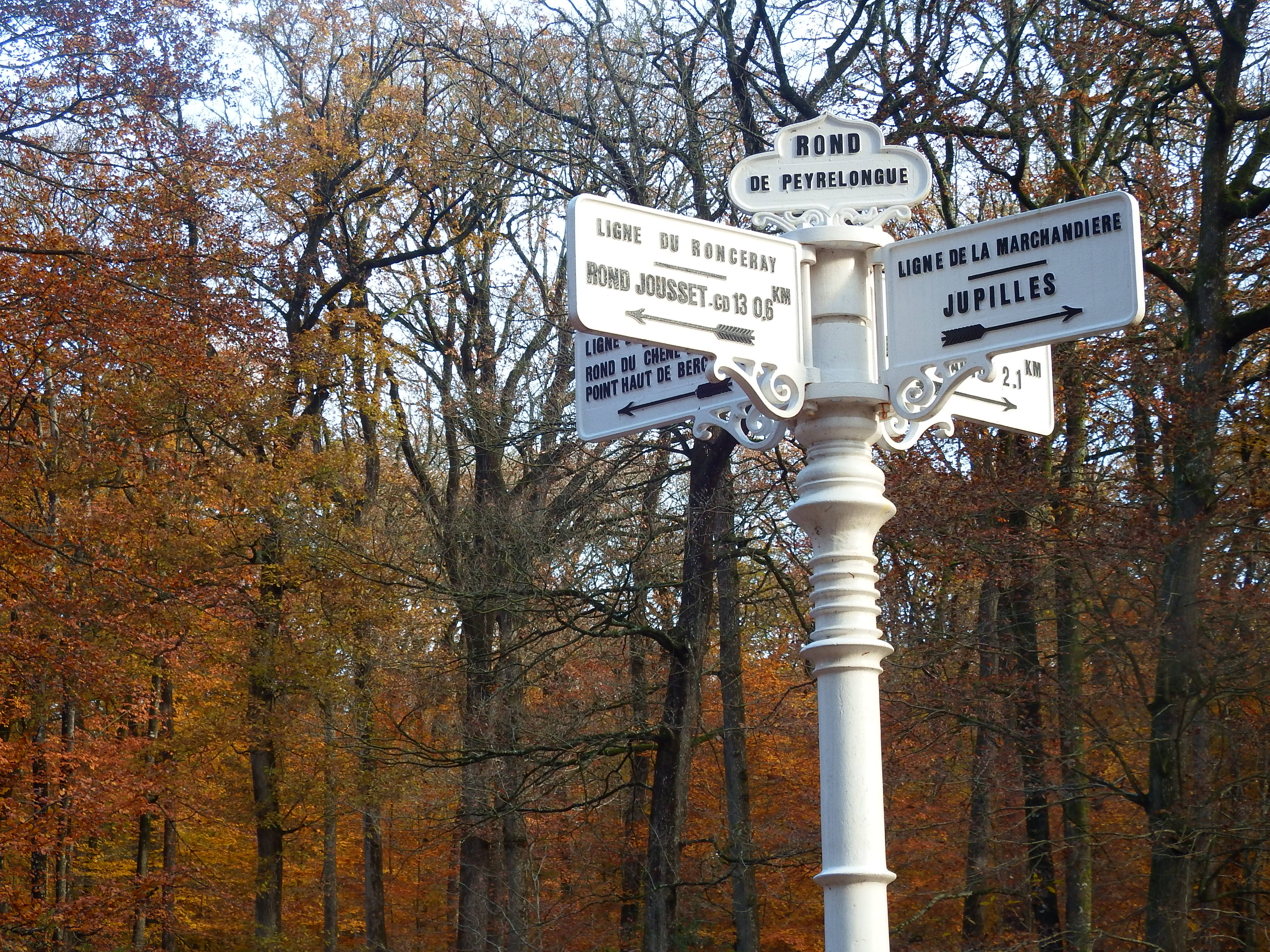 Rond point en étoile en Forêt de Bercé